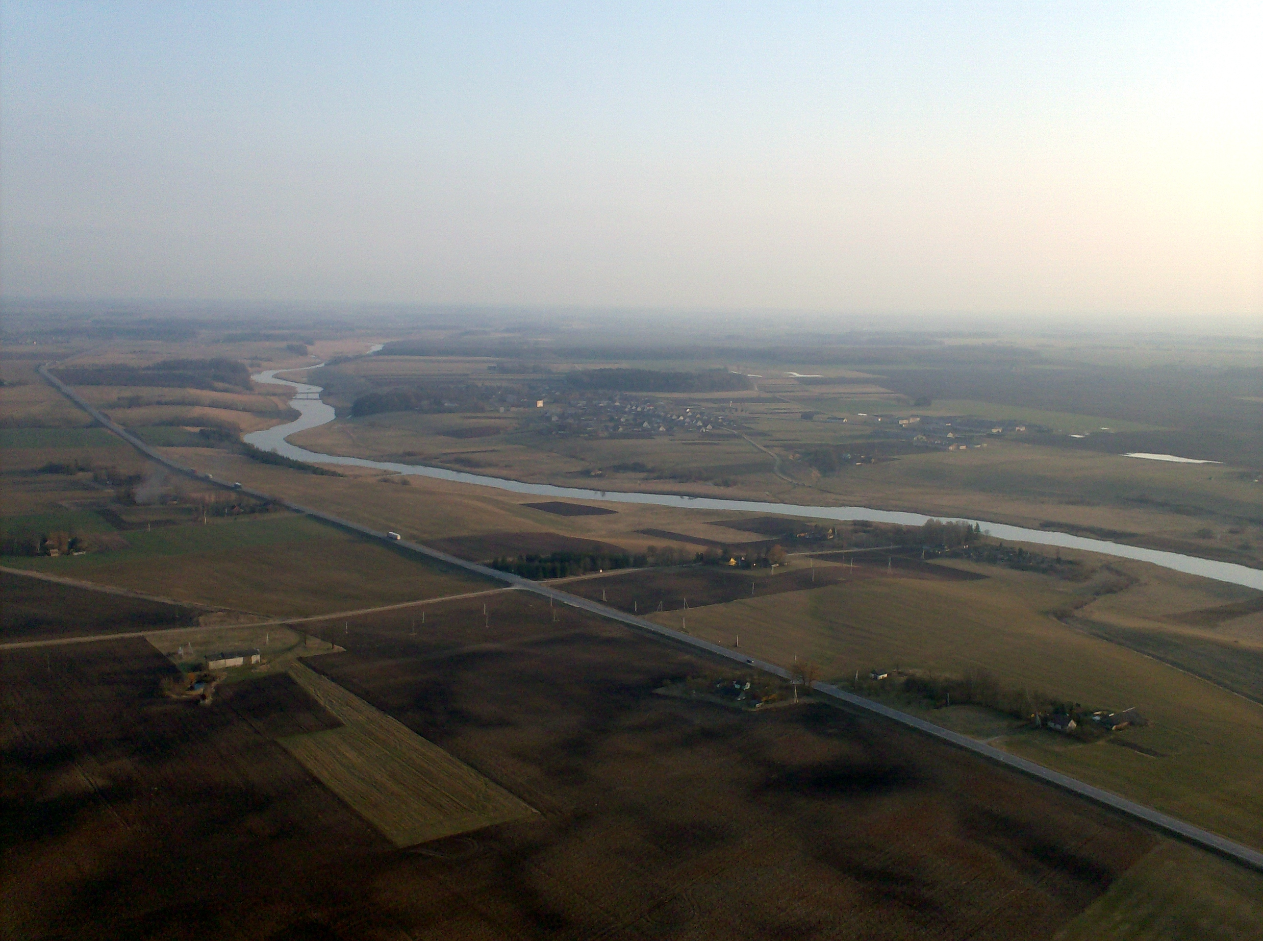 Žilpamūšis, Pasvalio raj.